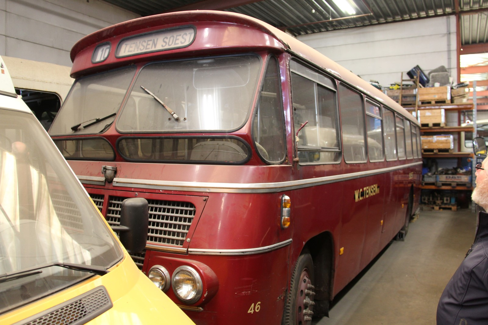 Museumbus Tensen 46 van de Stichting Veteraan Autobussen